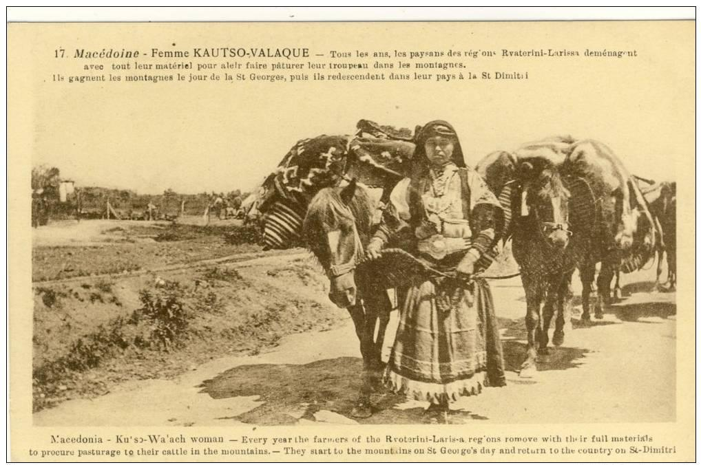 Влахиня в района на Катерини - Лариса през Първата световна война